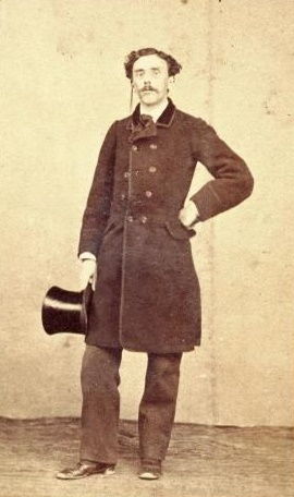 Evaristo Escalera, fotografía de J. Laurent. Museo de Historia de Madrid